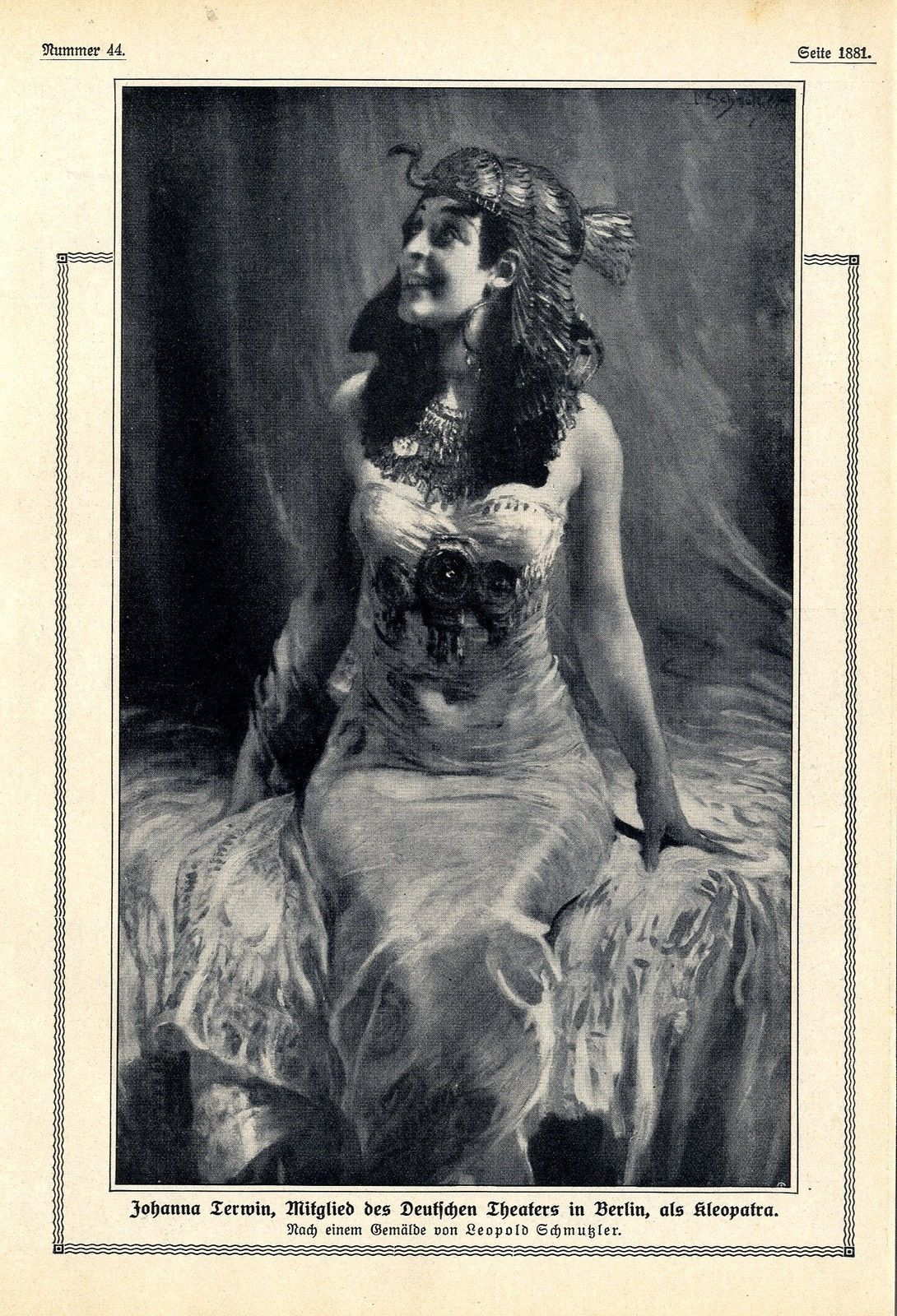 Johanna Terwin als Kleopatra Ölbild von Leopold Schmutzler.Fotografische Reproduktion in einer (unbekannten?) Zeitschrift Nr. 41, Seite 1881, unbekanntes Datum der Zeitschrift George Bernard Shaw Caesar und Cleopatra. Inszenierung am Deutschen Theater Berlin 1910/1911 mit Albert Steinrück und Johanna Terwin in den Titelrollen. Siehe; Bernard Shaw's Letters to Siegfried Trebitsch, 3. Juni 1911